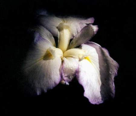 Цвете